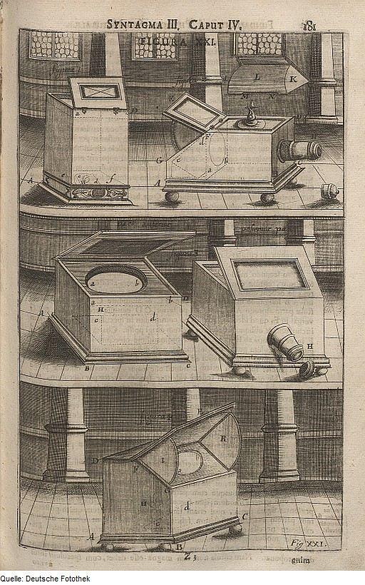 Original image description from the Deutsche Fotothek Optik & Lochkamera